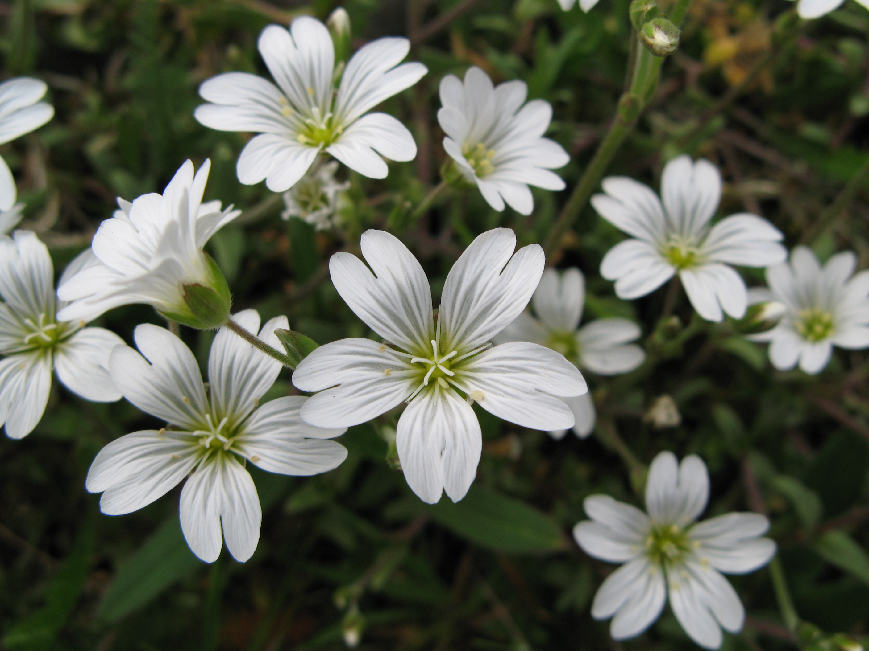 Cerastium arvense - Acker-Hornkraut - Detailansicht